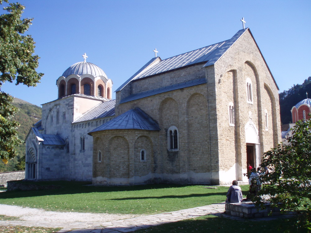 Crkva Manastira Studenice